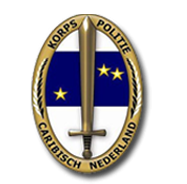 Loge des KPCN